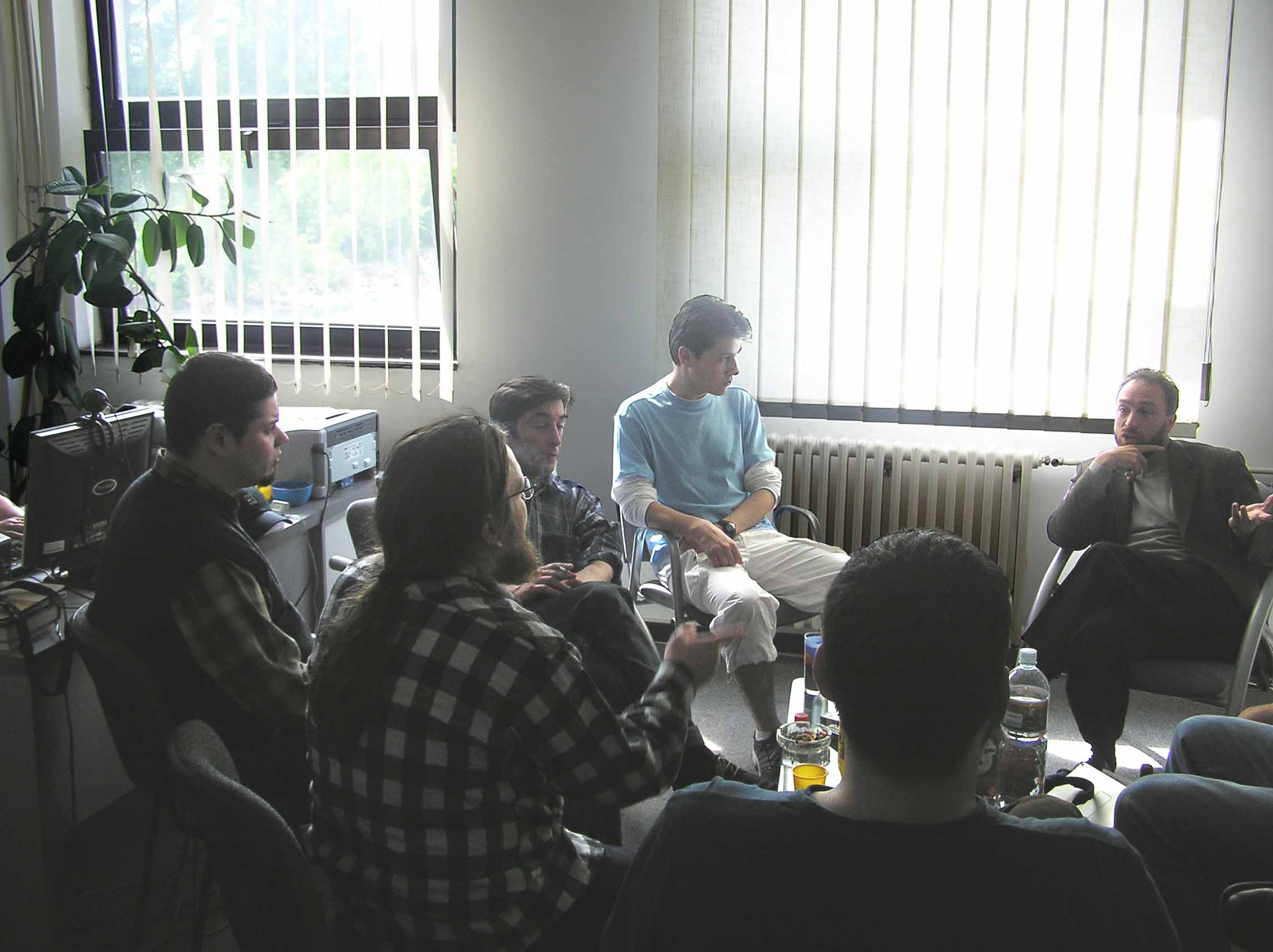 Слика неколицине која је била у РАСТКУ када је Jimbo Wales дошао у посету у БГ